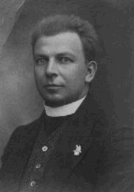 Antonín Vysloužil (1890 - 1945), Český katolický kněz.